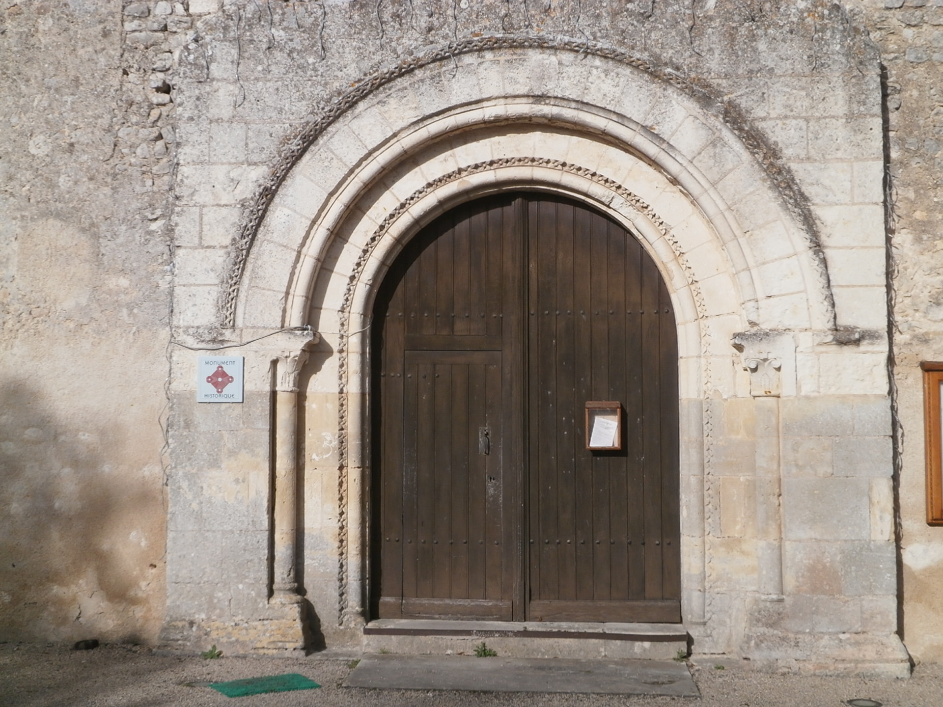 Saint-Quentin-sur-Indrois l- la porte méridionale de l'église